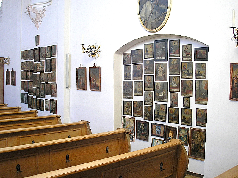 Wallfahrtskirche zu Unserer Lieben Frau (Bobingen, Landkreis Augsburg, Bayerisch-Schwaben). Votivbilder an der Südwand des Langhauses. Eigene Aufnahme, Okt. 2007 / Pilgrimage church of Our Lady (Bobingen near Augsburg, Bavaria, Germany). Interior. Votive paintings at the southern side of the nave. Own photo, Oct. 2007